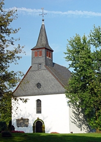 schrumpf_torsten